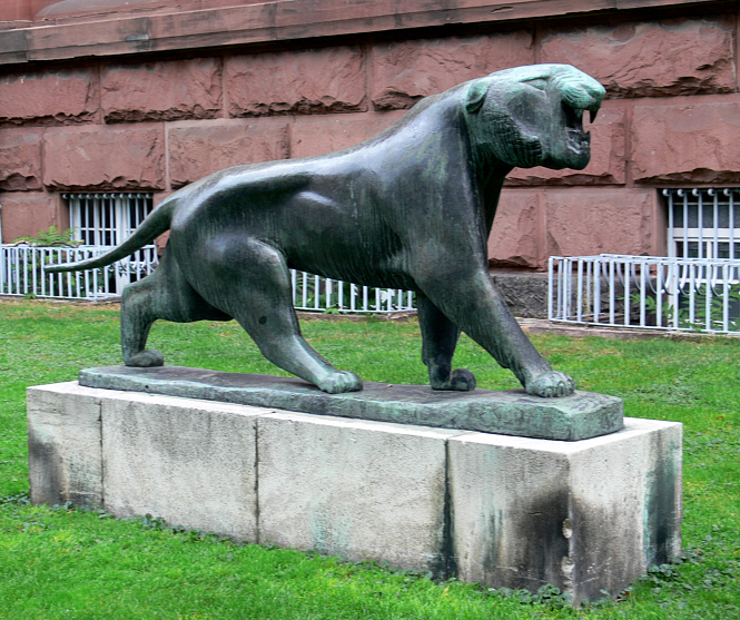 Kunsthalle Mannheim, Skulpturengarten Philipp Harth (1887–1968): Tiger, 1936, Bronze (Geschenk der Mannheimer Motorenwerke)